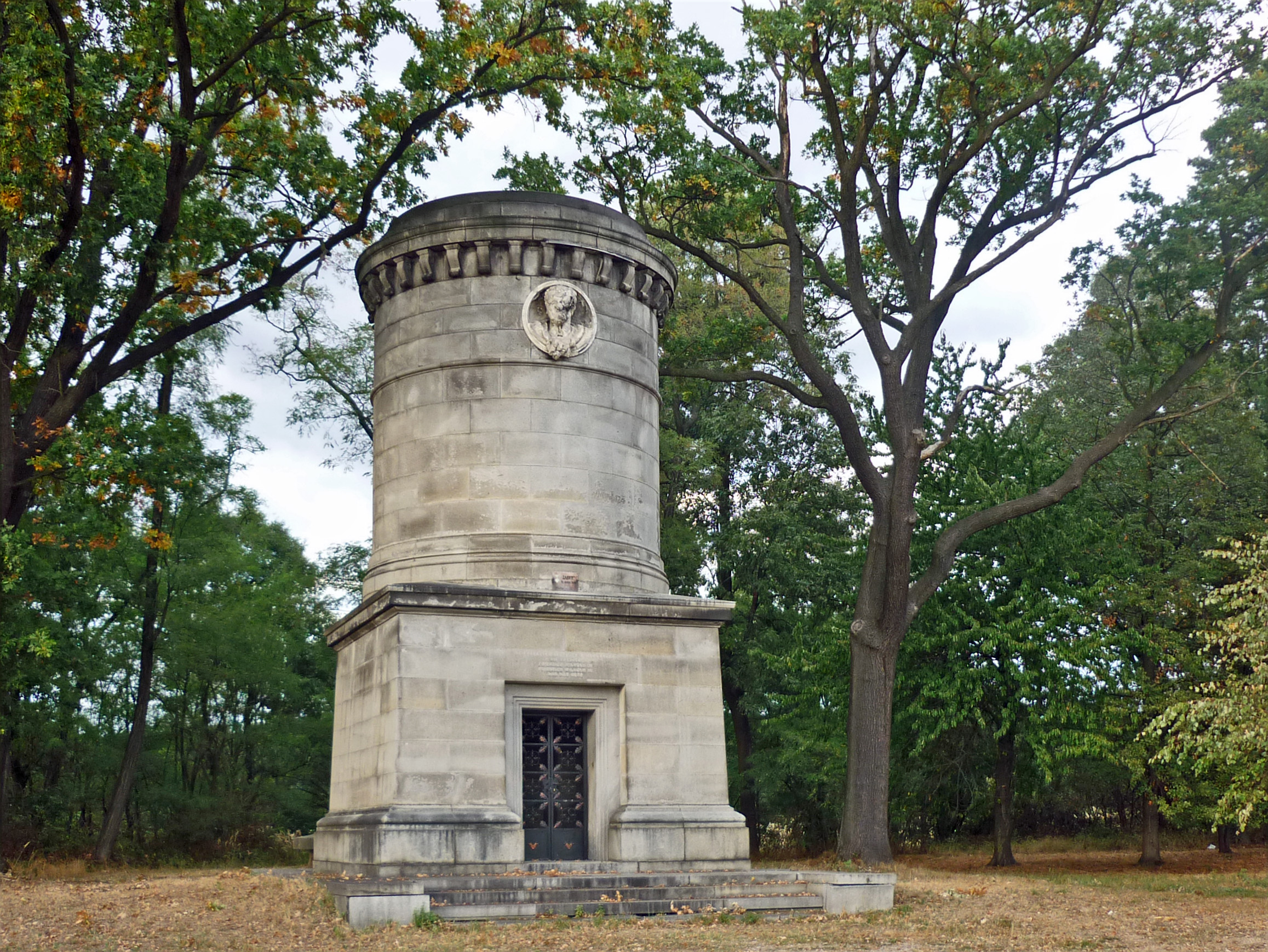 Blücher-Mausoleum in Krieblowitz/Krobielowice (Schlesien) an der Straße nach Kanth/Kąty Wrocławskie. Aufschrift an der Vorderfront des Mausoleums: „Dem Fürsten Blücher von Wahlstatt die Könige Friedrich Wilhelm III., Friedrich Wilhelm IV. und das Heer. Vollendet MDCCCLIII.“ Hinter dem Mausoleum befindet sich die Familiengruft Blücher.